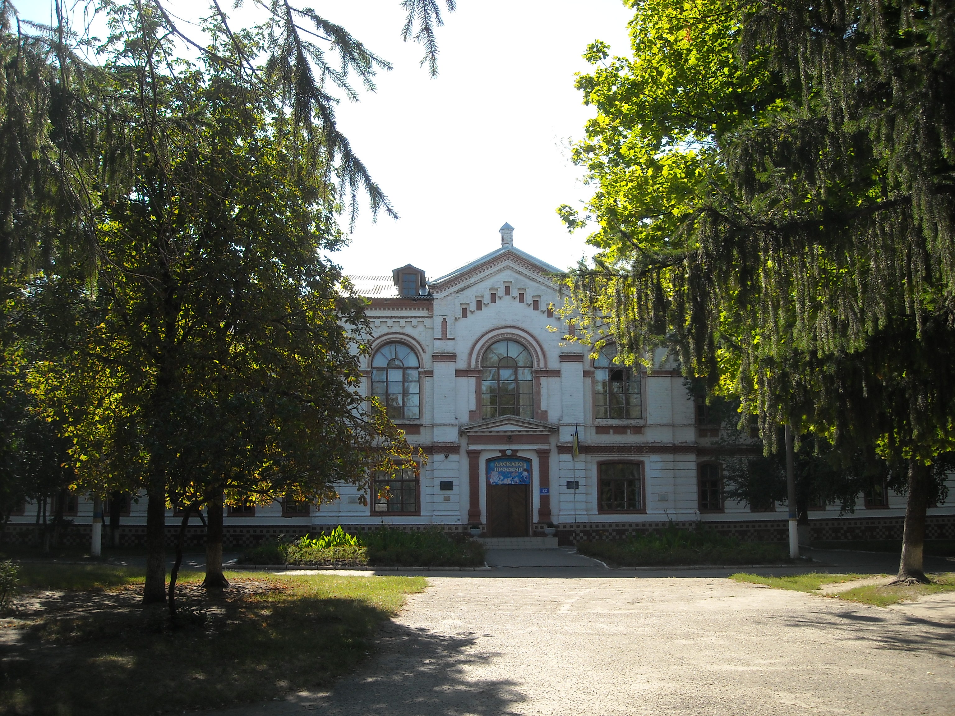 Реальне училище (сучасне використання — школа), Ізюм, вулиця Старопоштова, 22